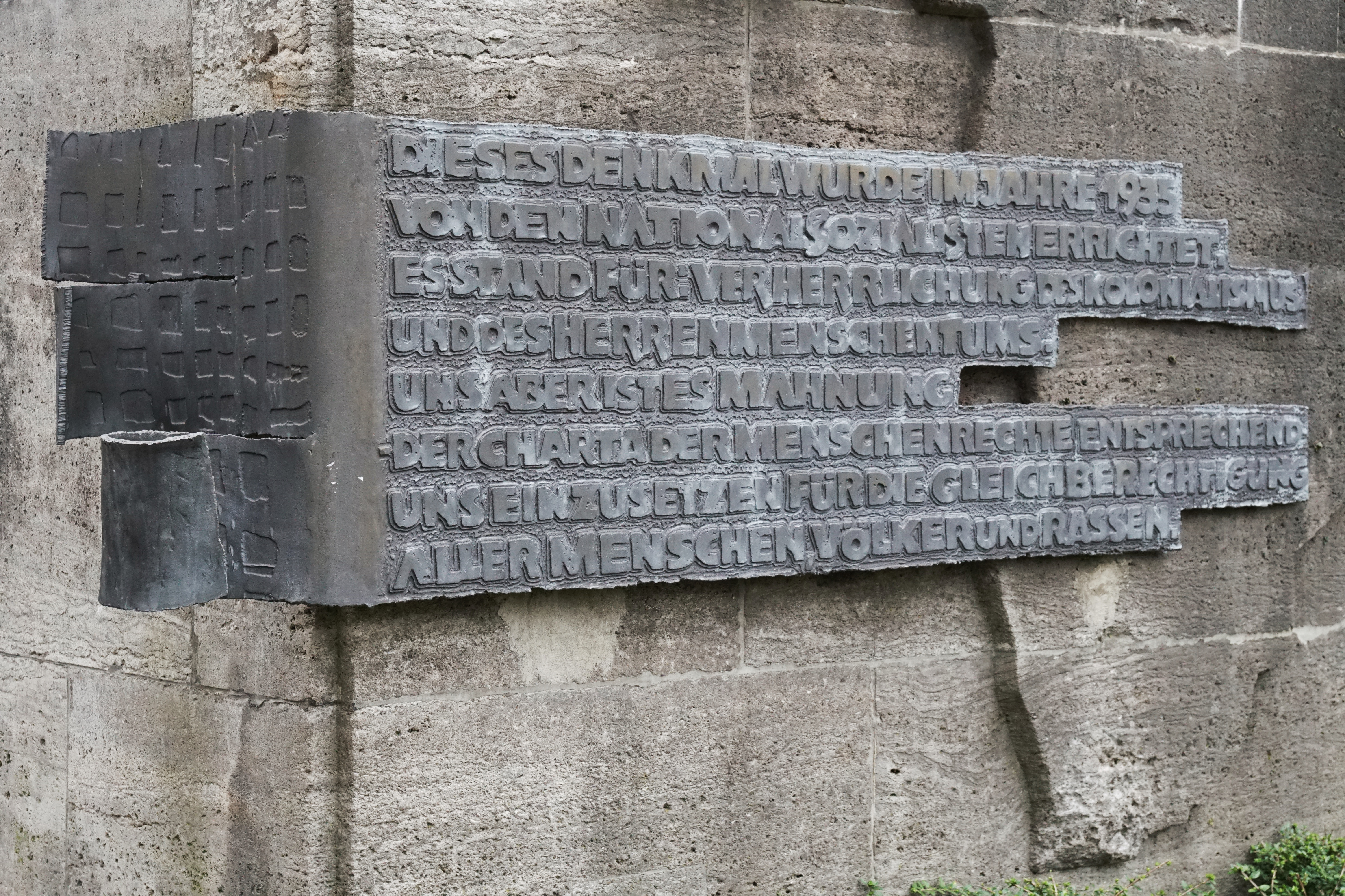 Mahntafel gegen Kolonialismus am Karl-Peters-Denkmal in Hannover Inschrift der Mahntafel: DIESES DENKMAL WURDE IM JAHRE 1935 VON DEN NATIONALSOZIALISTEN ERRICHTET. ES STAND FÜR: VERHERRLICHUNG DES KOLONIALISMUS UND DES HERRENMENSCHENTUMS. UNS ABER IST ES MAHNUNG DER CHARTA DER MENSCHENRECHTE ENTSPRECHEND UNS EINZUSETZEN FÜR DIE GLEICHBERECHTIGUNG ALLER MENSCHEN, VÖLKER UND RASSEN.